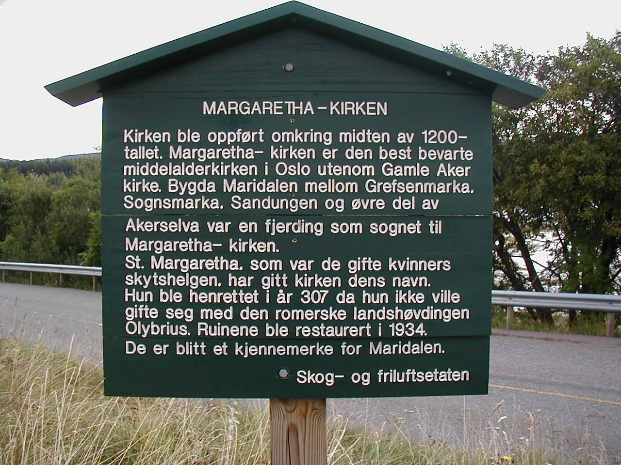 This is a description of the Margaretha Kirken ruin from the 1200s. Transcript (Norwegian): Kirken ble oppført omkring midten av 1200-tallet. Margaretha- kirken er den best bevarte middelalderkirken i Oslo utenom Gamle Aker kirke. Bygda Maridalen mellom Grefsenmarka, Sognsmarka. Sandungen og øvre del av Akerselva var en fjerding som sognet til Maargaretha- kirken. St. Margaretha, som var de gifte kvinners skythelgen, har gitt kirken dens navn. Hun ble henrettet i år 307 da hun ikke ville gifte seg med den romerske landshøvdingen Olybrius. Ruinene ble restaurert i 1934. De er blitt et kjennemerke for Maridalen.